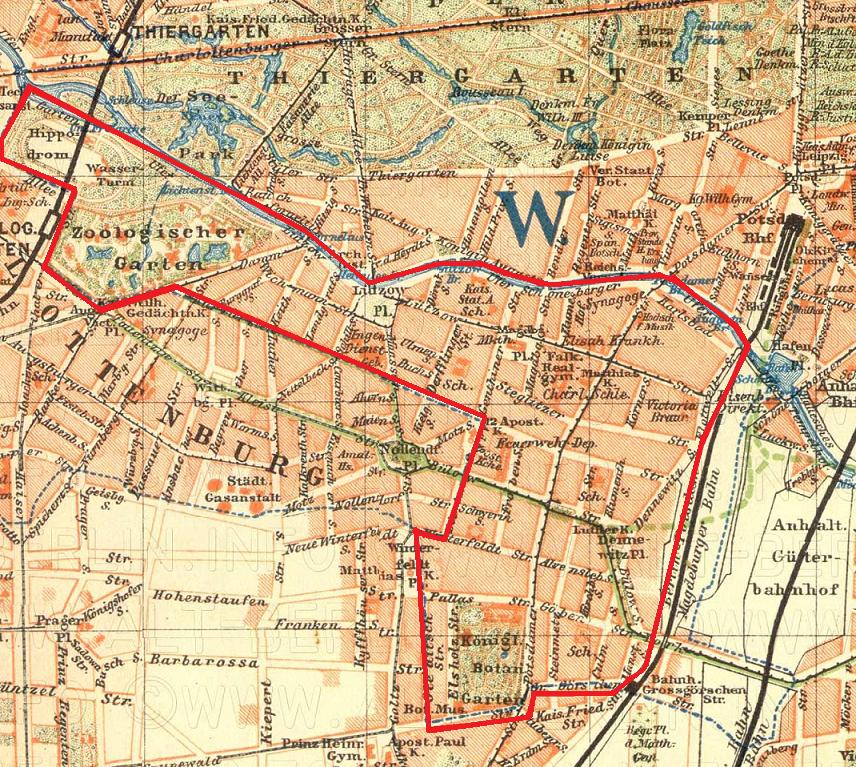 Plan du quartier "Schöneberger" datant de 1897